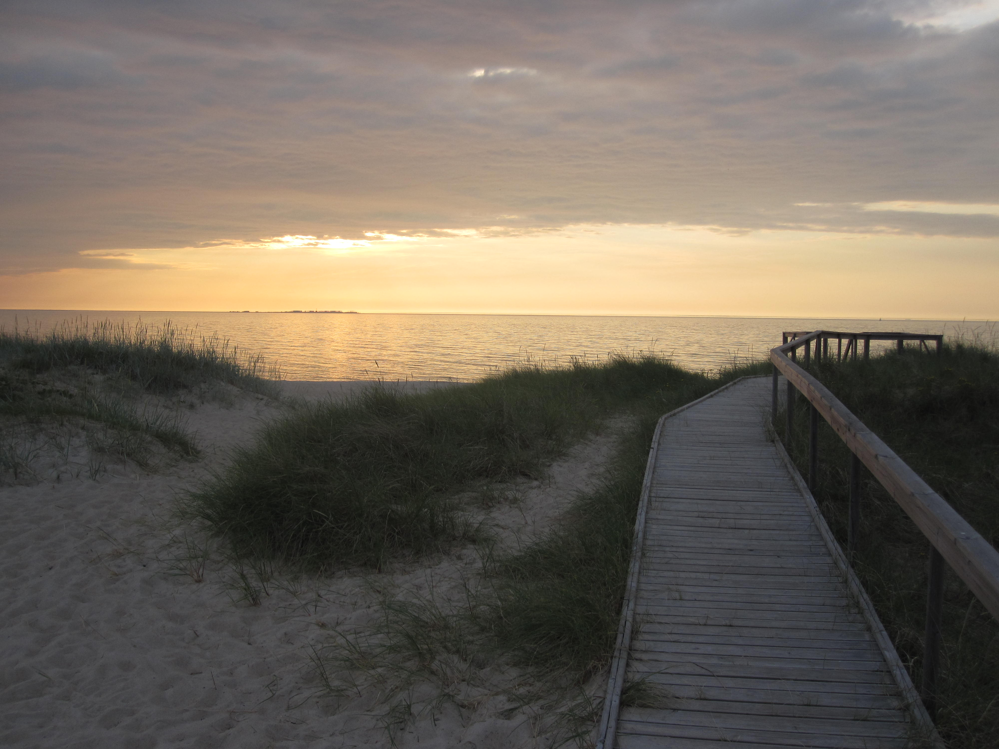 Pilt tehtud Perakülas Nõva vallas Läänemaal.